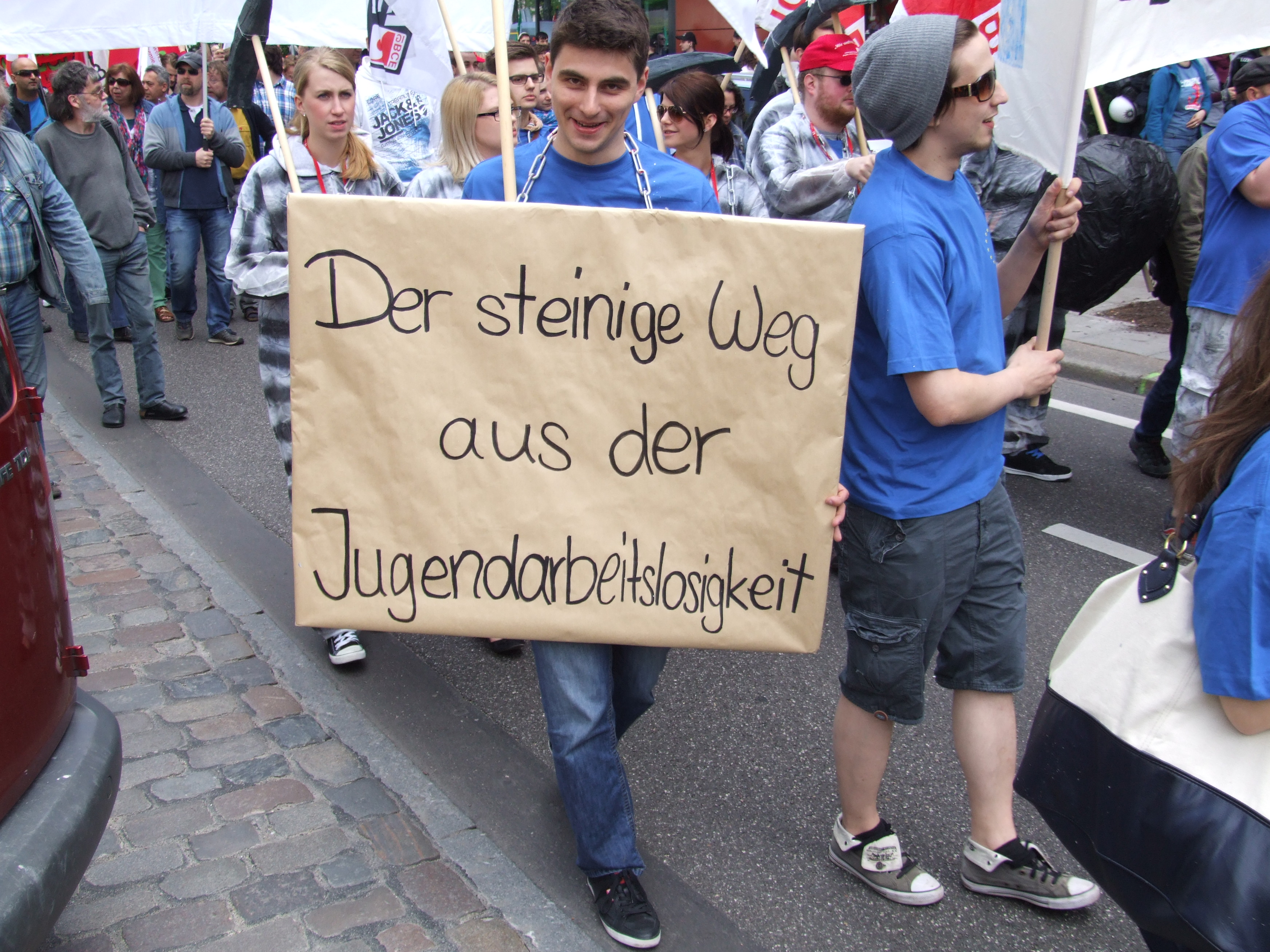 Tag der Arbeit 1. Mai 2014 - Demonstration in Hamburg - IG Bergbau, Chemie, Energie - IG BCE - Transparent zur Kampagne: Der steinige Weg aus der Jugendarbeitslosigkeit